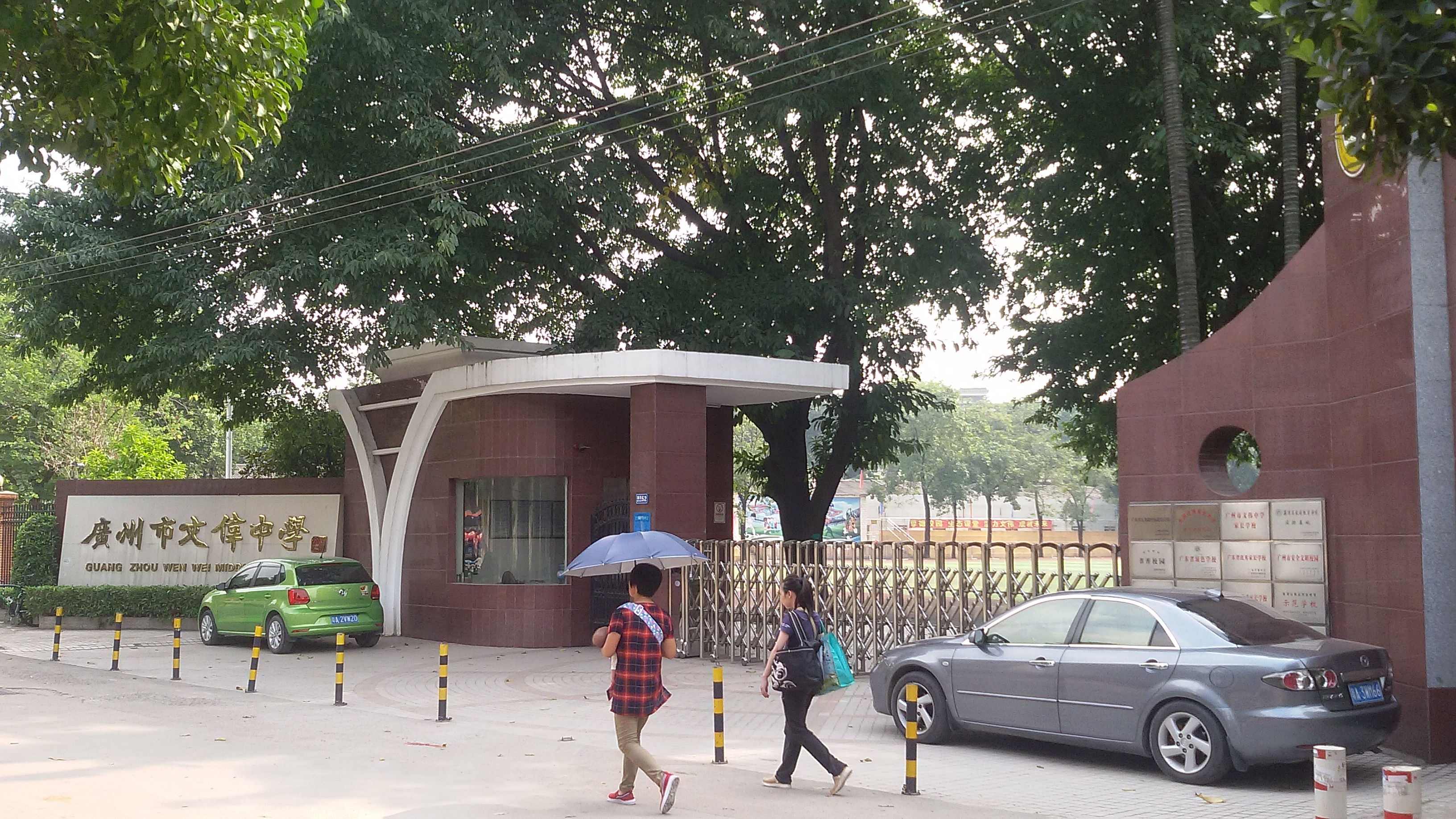 粵語: 廣州市文偉中學嘅正門